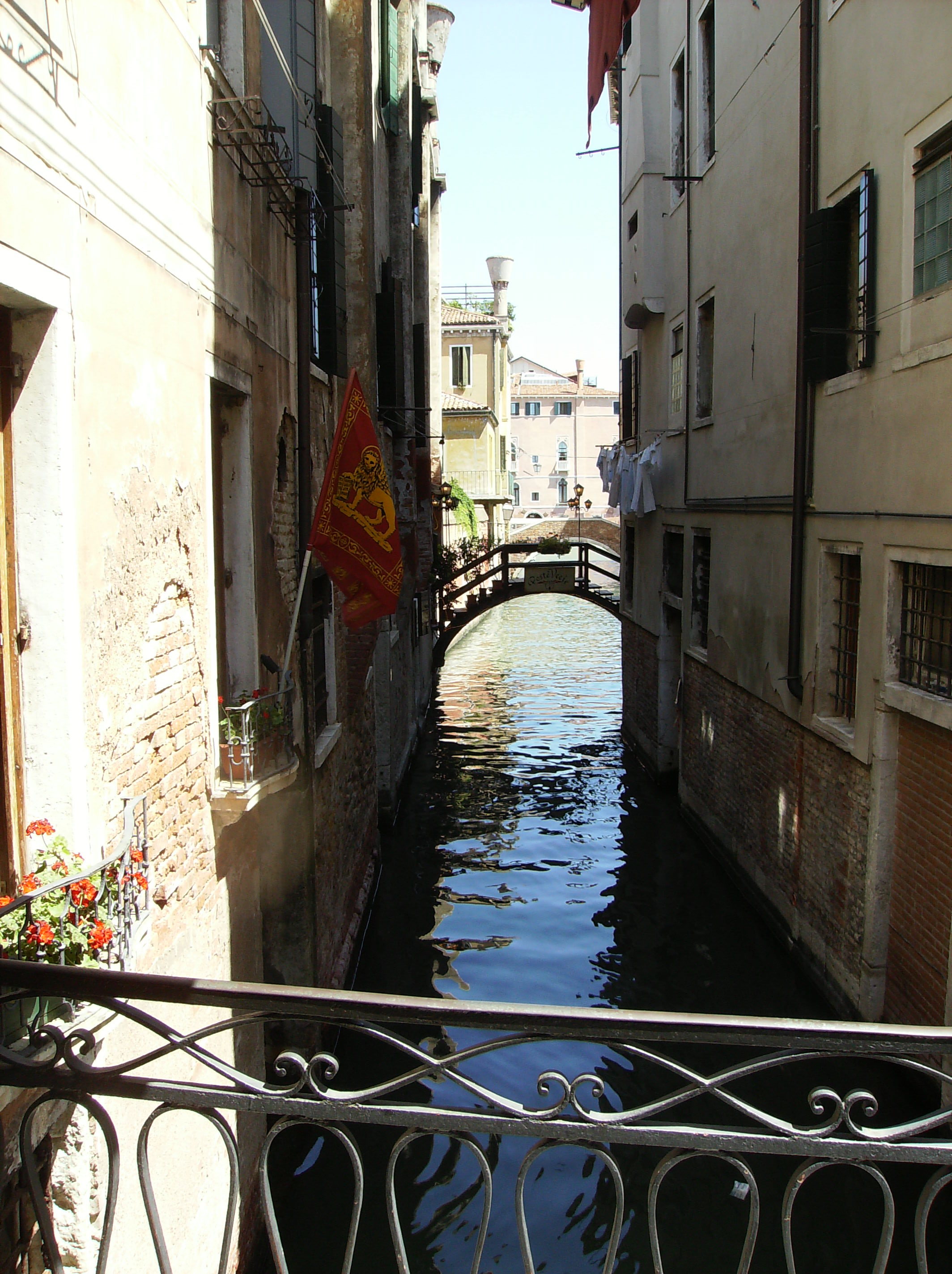 rio delle beccari - venise